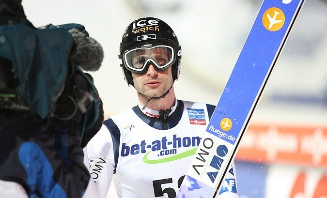 Wolfgang Loitzl podczas serii kwalifikacyjnej do konkursu Mistrzostw Świata 2013 na skoczni normalnej